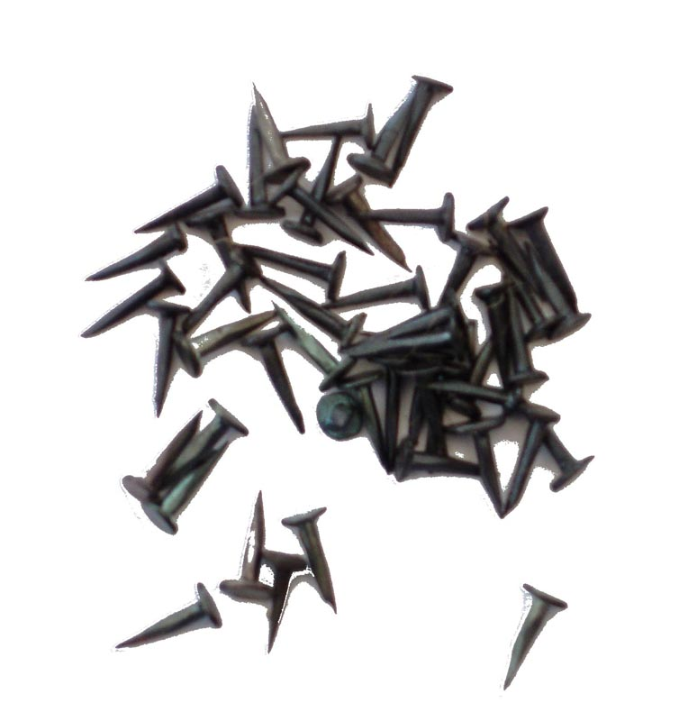 Semences de tapissier garnisseur Photographer Isabelle Grosjean ZA Date 2001-09-01 License GFDL-self Camera Sony PSC-P92 ZA